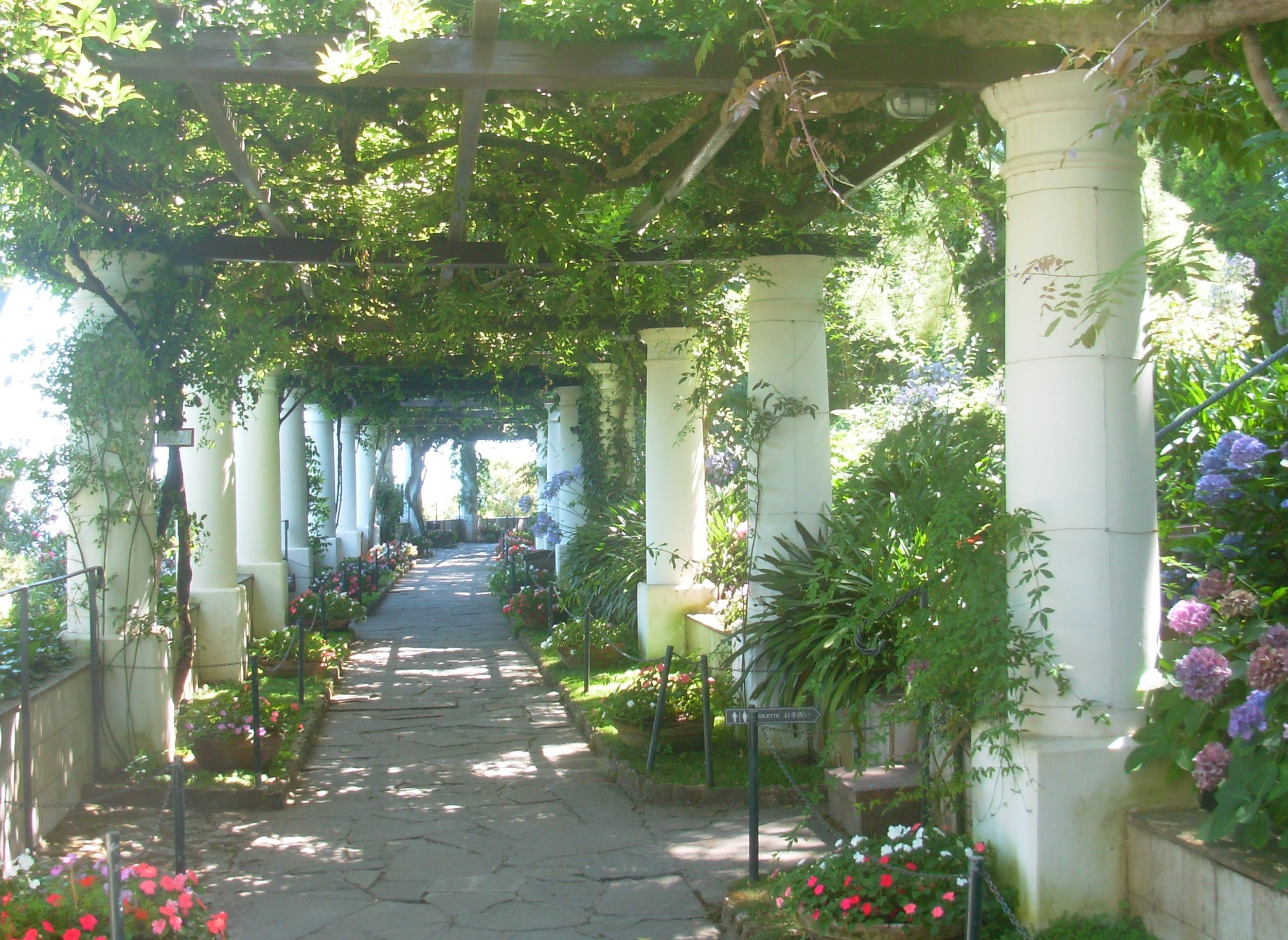 Pergola at Villa San Michele in Anacapri